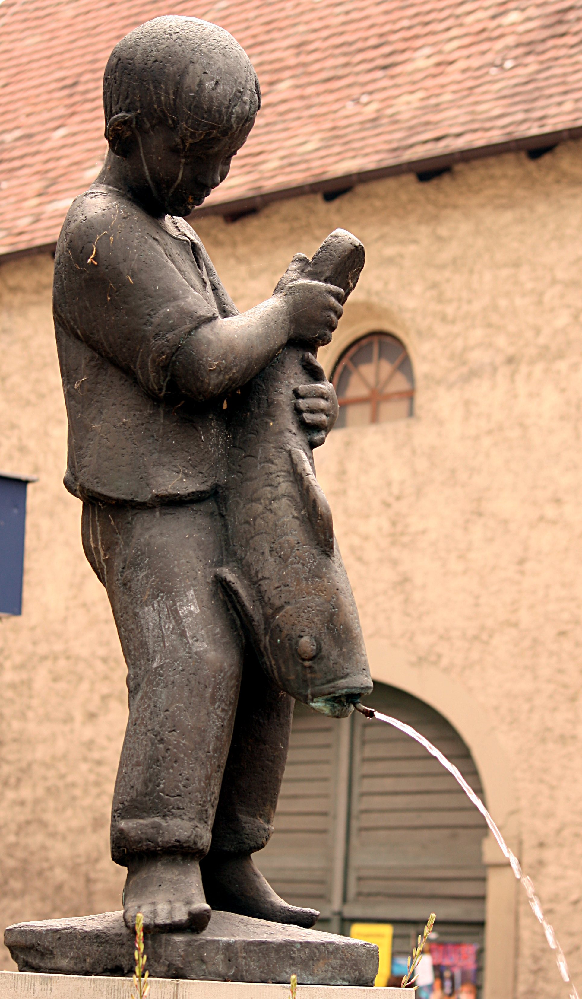 Überlingen,_Skulptur,_Trinkwasserspender